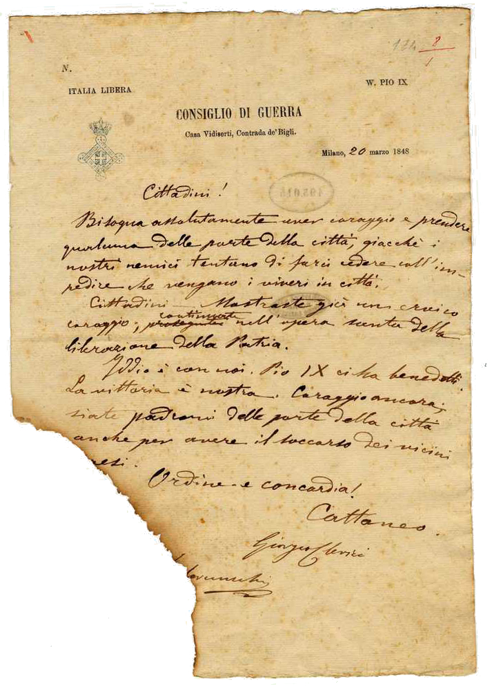 Proclama di Cattaneo e Cernuschi ai milanesi del 20 marzo 1848